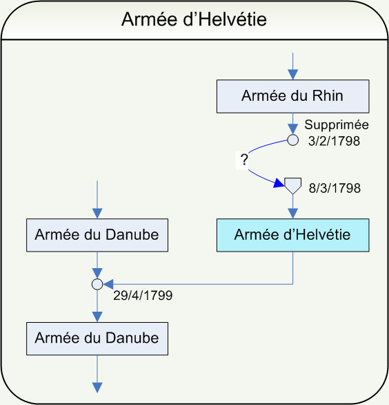 Ordinogramme de l'armée d'Helvétie Dessin réalisé par Papier K